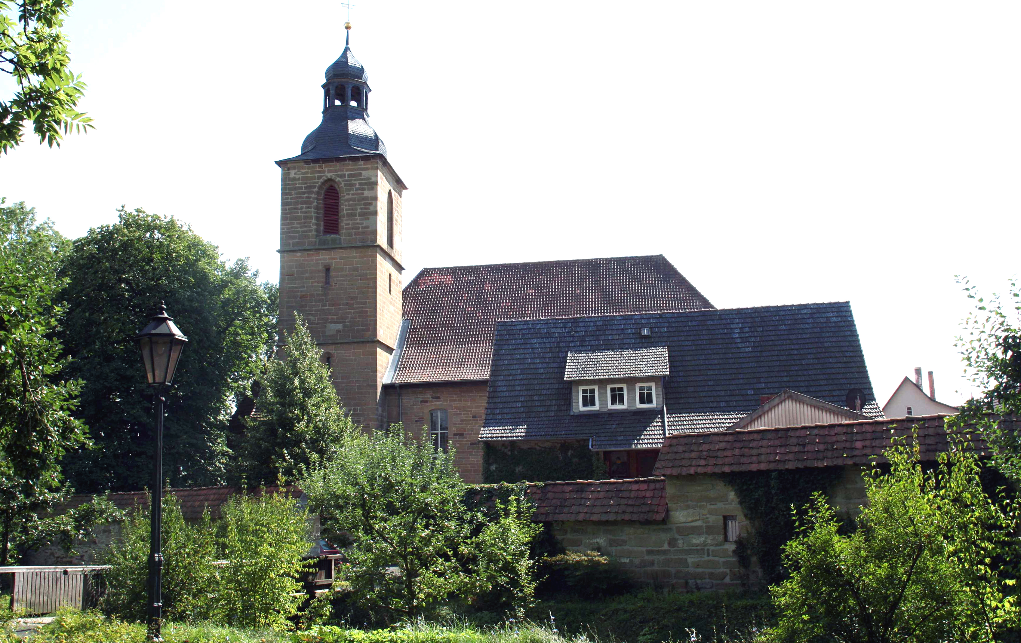 ev. Stadtkirche Bad RodachJohanniskirche Bad Rodach im Landkreis Coburg